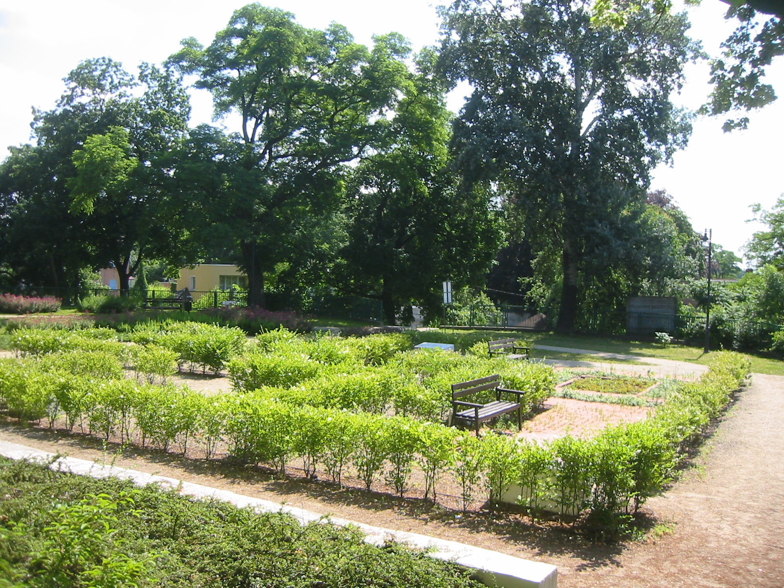 Erinnerungsort an die Villa Wolf im Waszkiewicz-Park